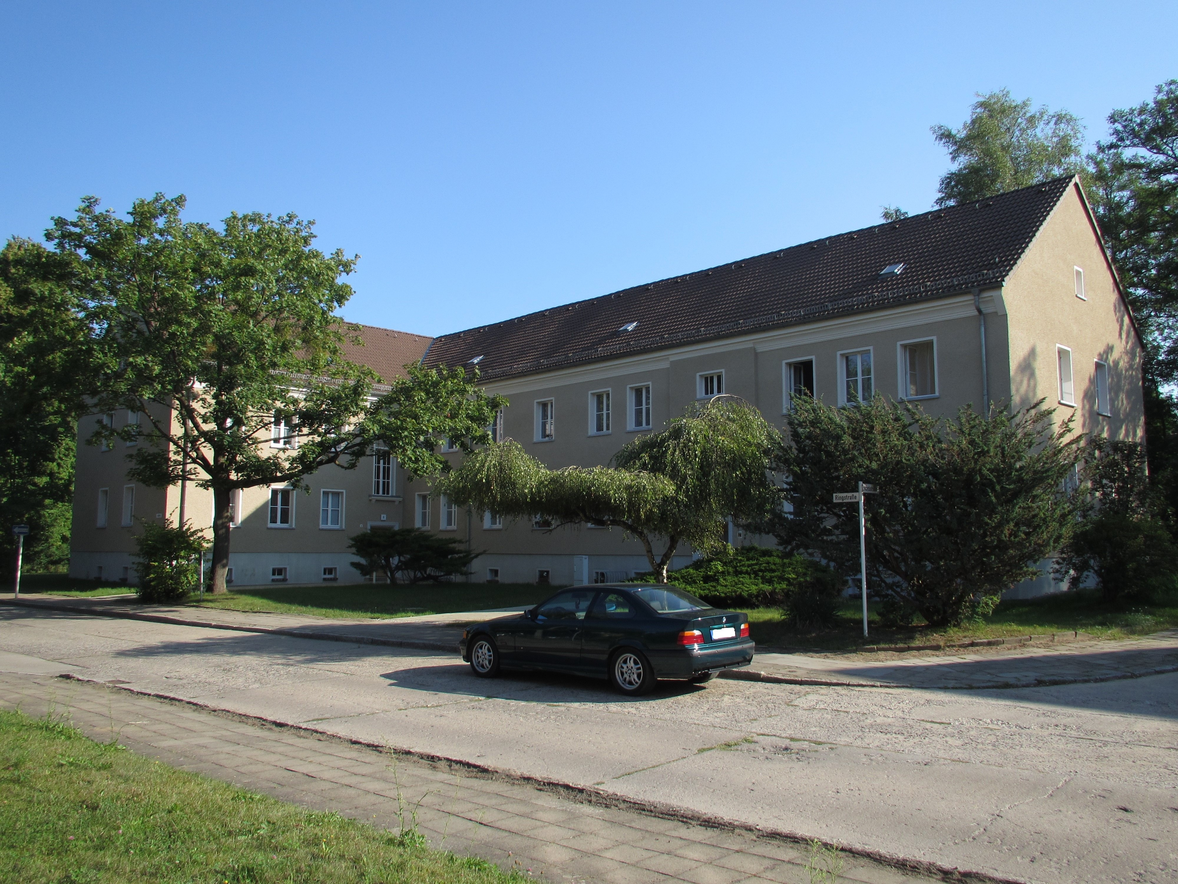 Seehaussiedlung Wohnungsbaugenossenschaft (WBG) Aufbau eG Strausberg - denkmalgerecht wärmegedämmtes Haus aus den 50er Jahren in Strausberg Nord Nähe Wriezener Straße